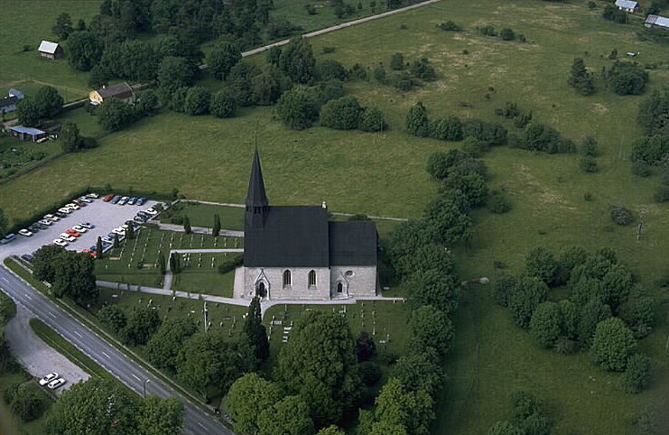 Motiv: Väte kyrka Nyckelord: Flygbilder, Riksintressen Kategori: Kyrkomiljö Väte kyrka. Länsväg 142 går förbi väster om kyrkan.